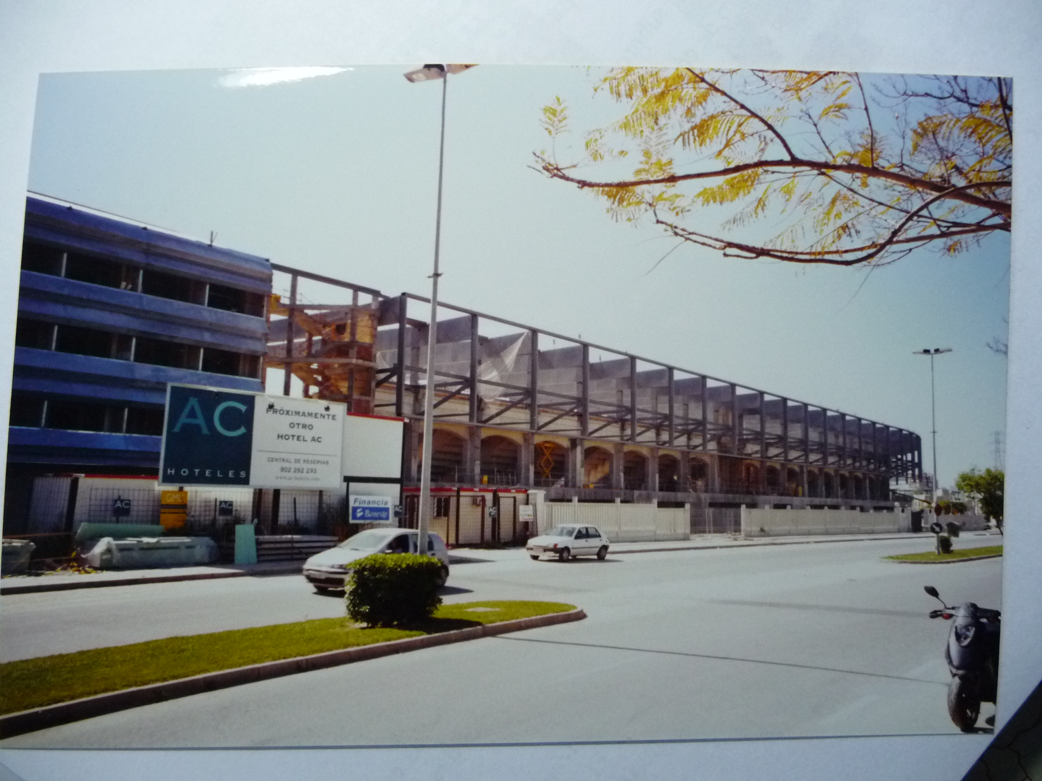 Jerez 2002, Jerez de la Frontera (Andalusia, Spain)